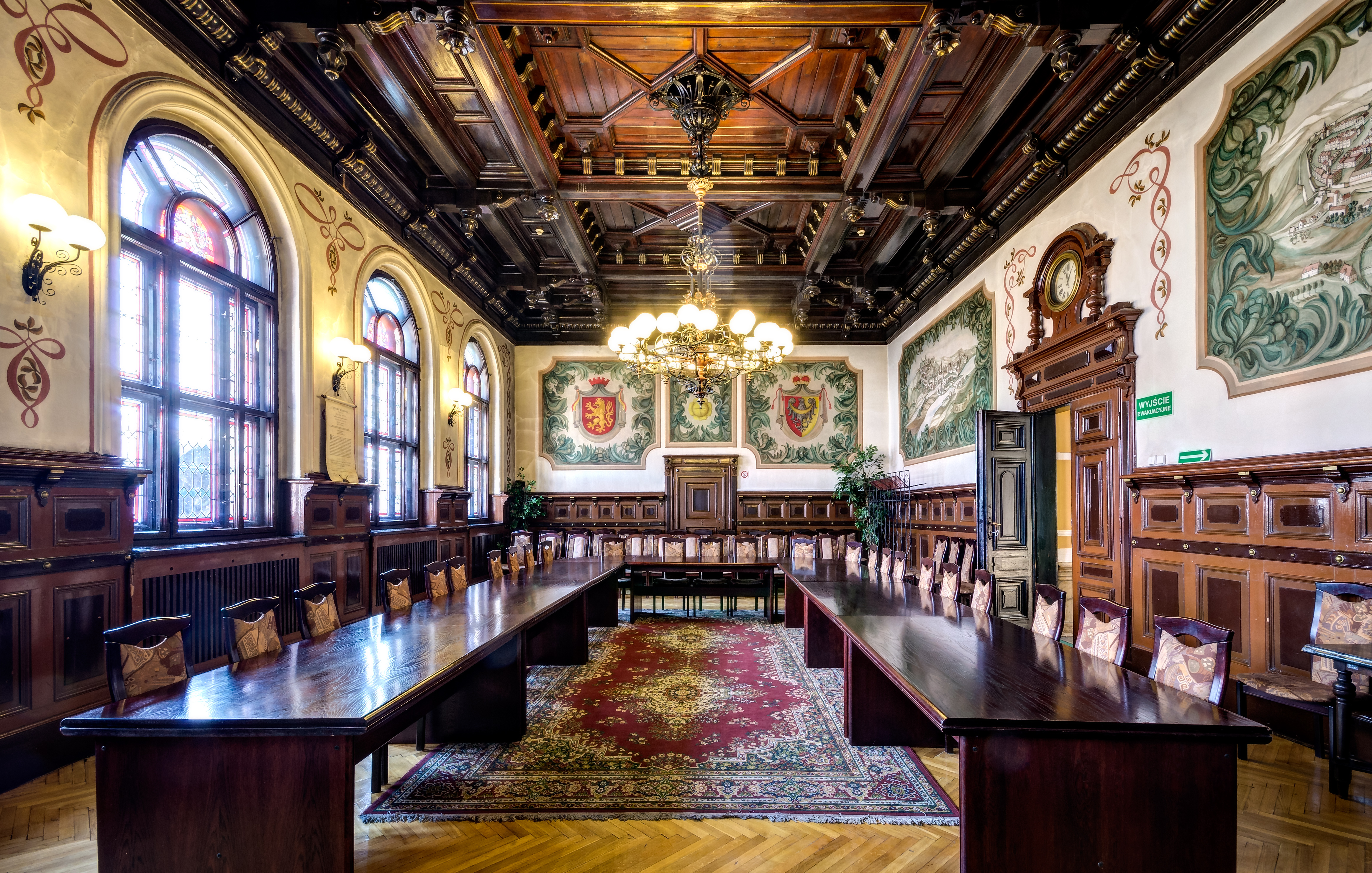 Kłodzko, ratusz, XVI, XVIII, 1890 - Sala reprezentacyjna